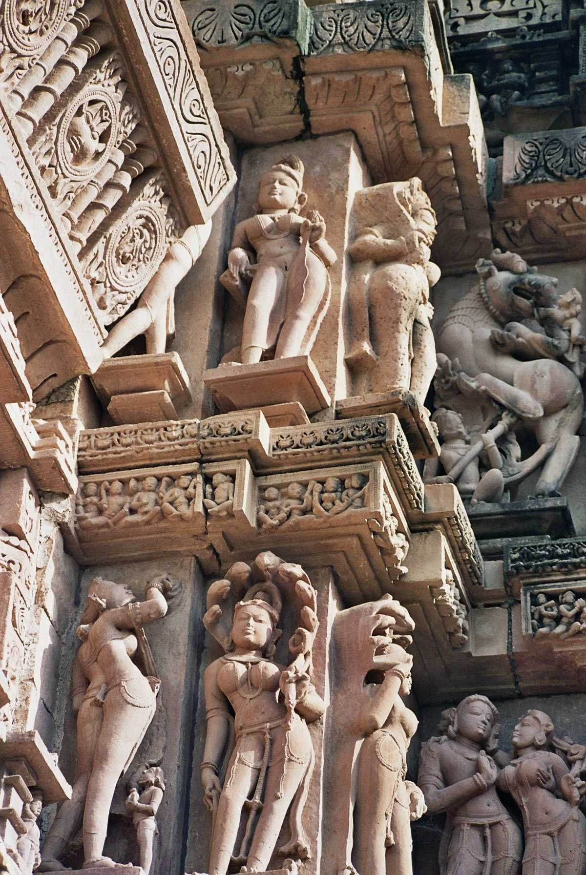 Khajuraho Temple, India Templo de Khajuraho, India. Picture take by User:Airunp